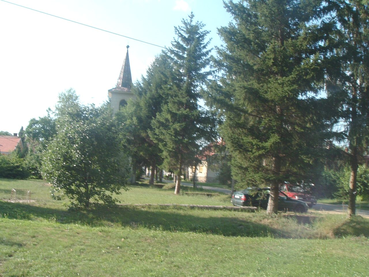 Kiszsidány, Hungary